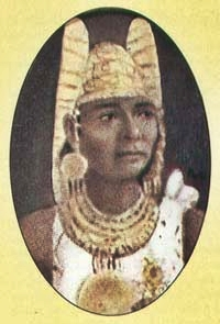 Zipa Saguanmachica o Saguamanchica (?)